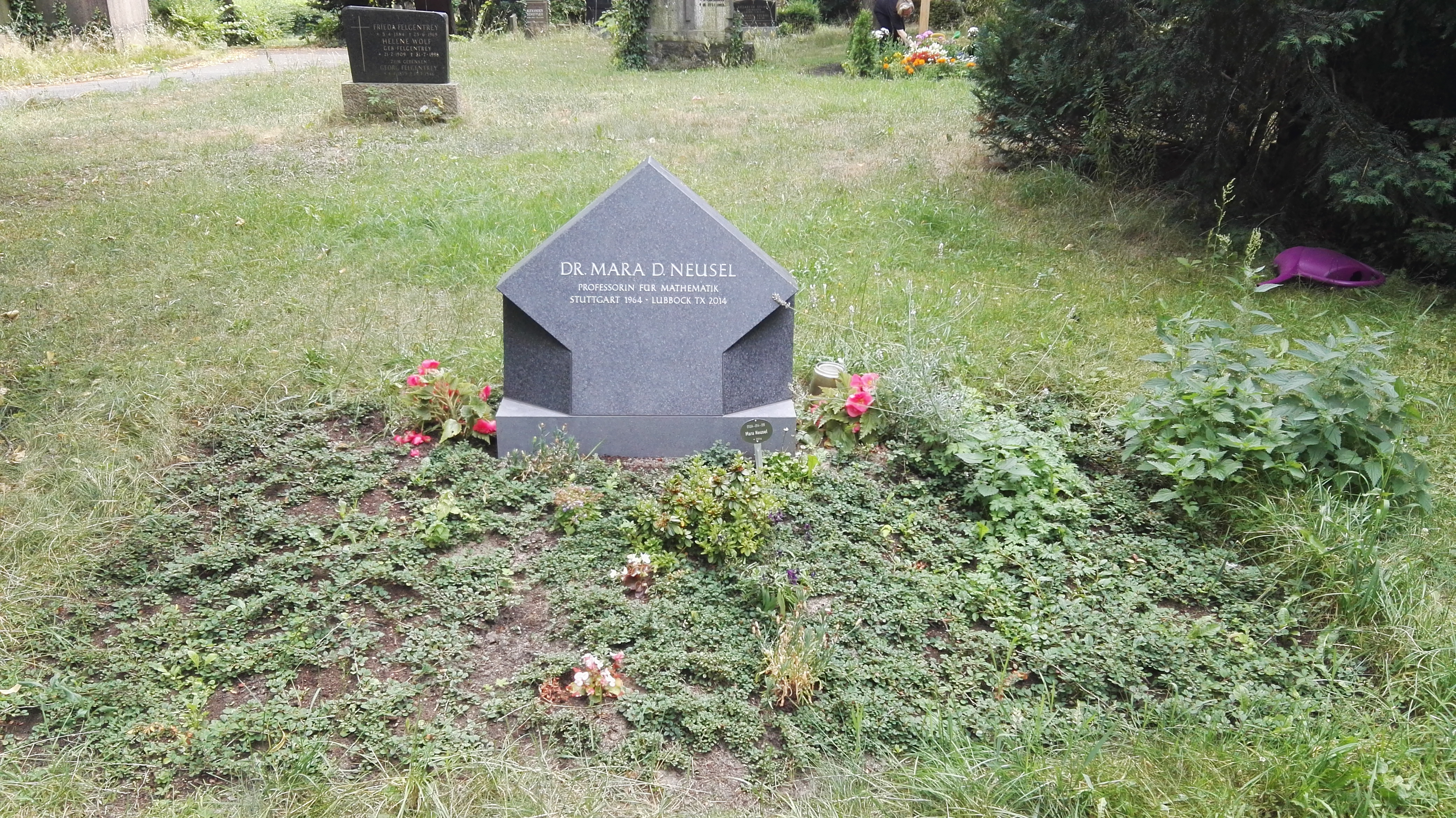 Grab der Professorin Mara Dicle Neusel auf dem Luisenstädtischen Friehof in Berlin